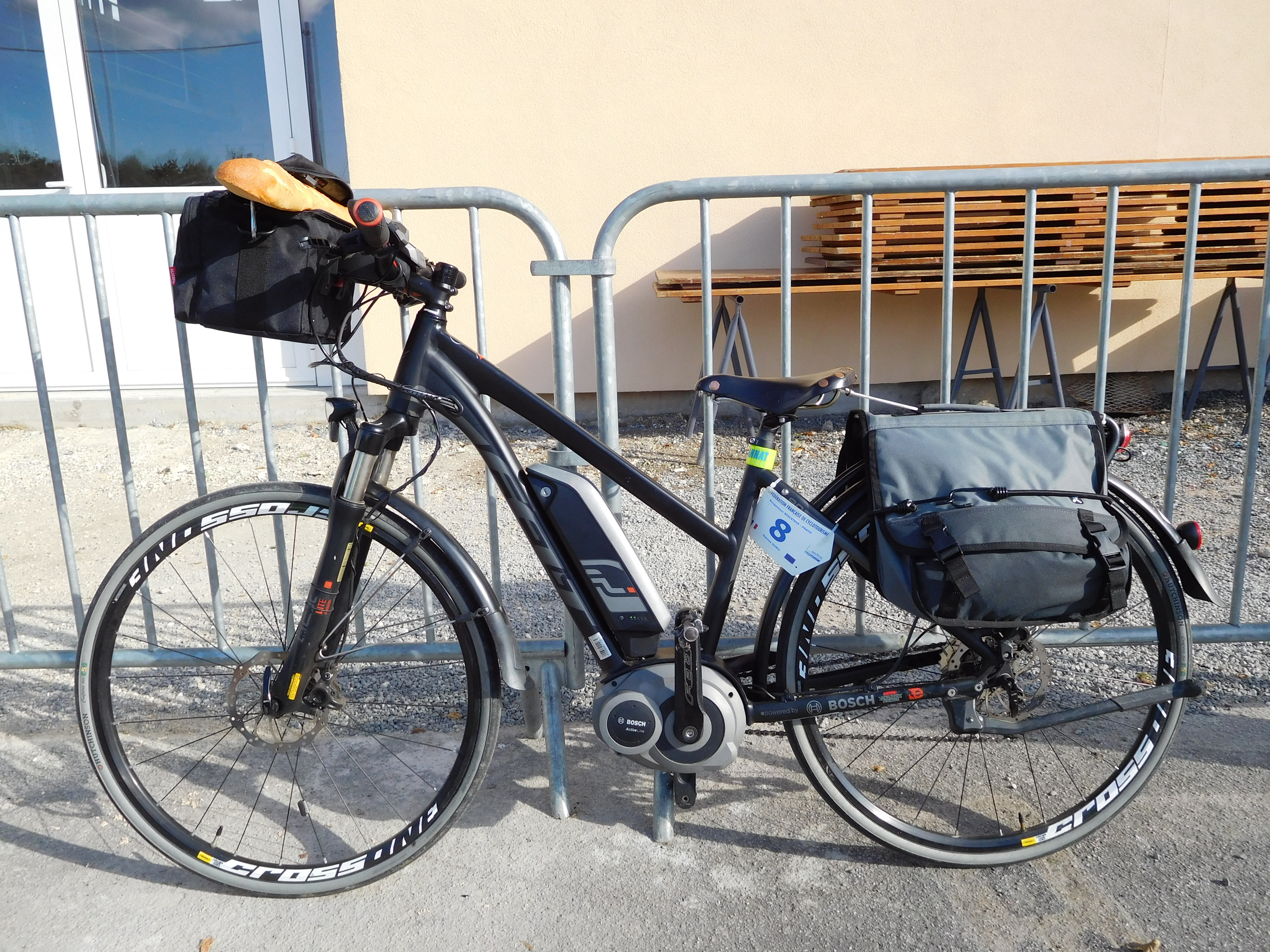 Vélo à assistance électrique (VAE) Felt de 2016, moteur Bosch, équipé de sacoches, de roues Mavic Crossone et de pneus Hutchinson, à l'arrivée.